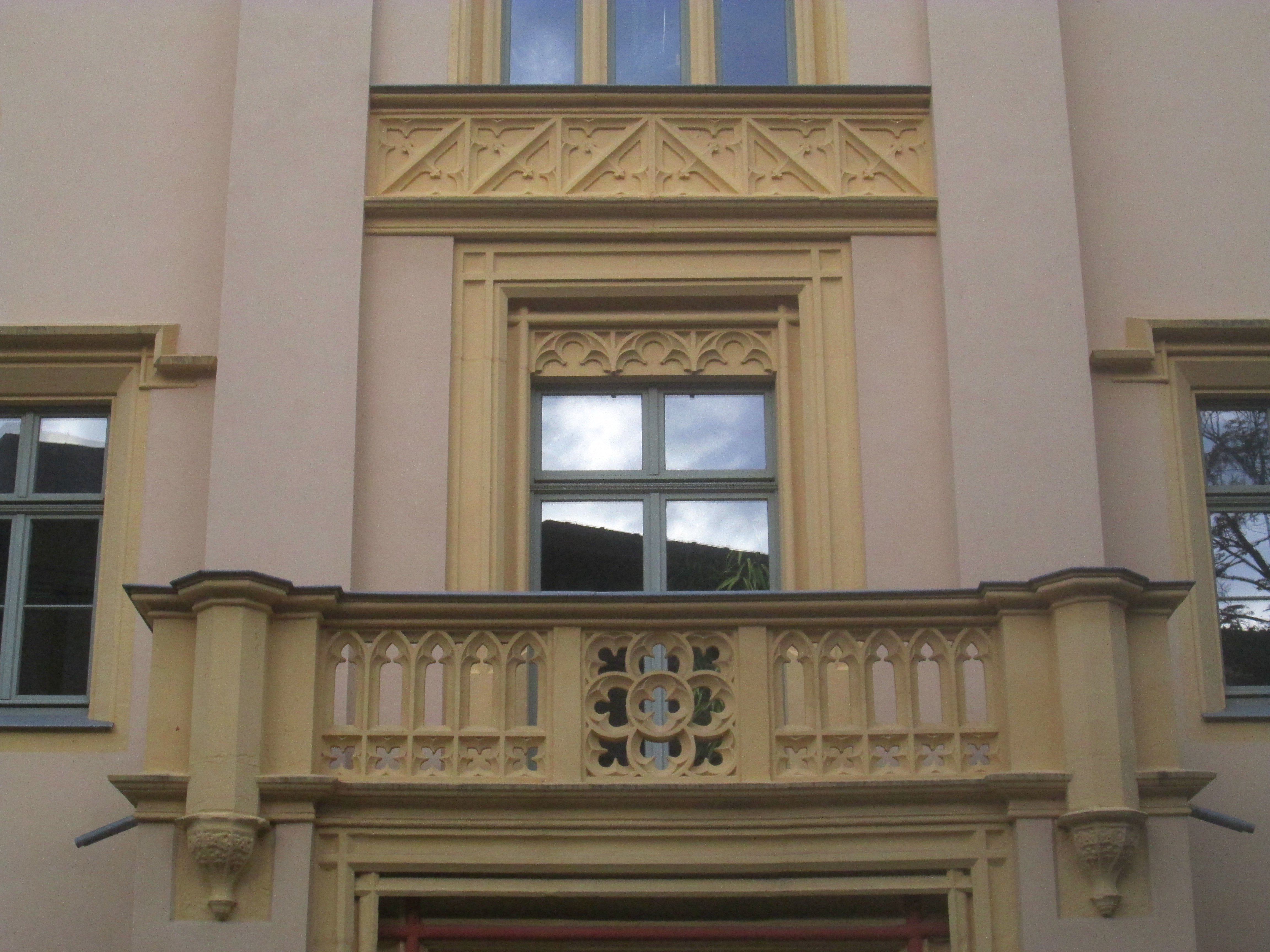 Villa Glenck, Gotha, Detail